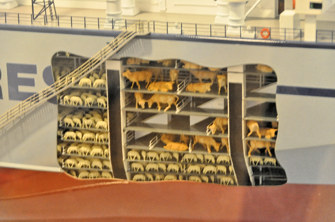 Meyer Werft, Papenburg 2013